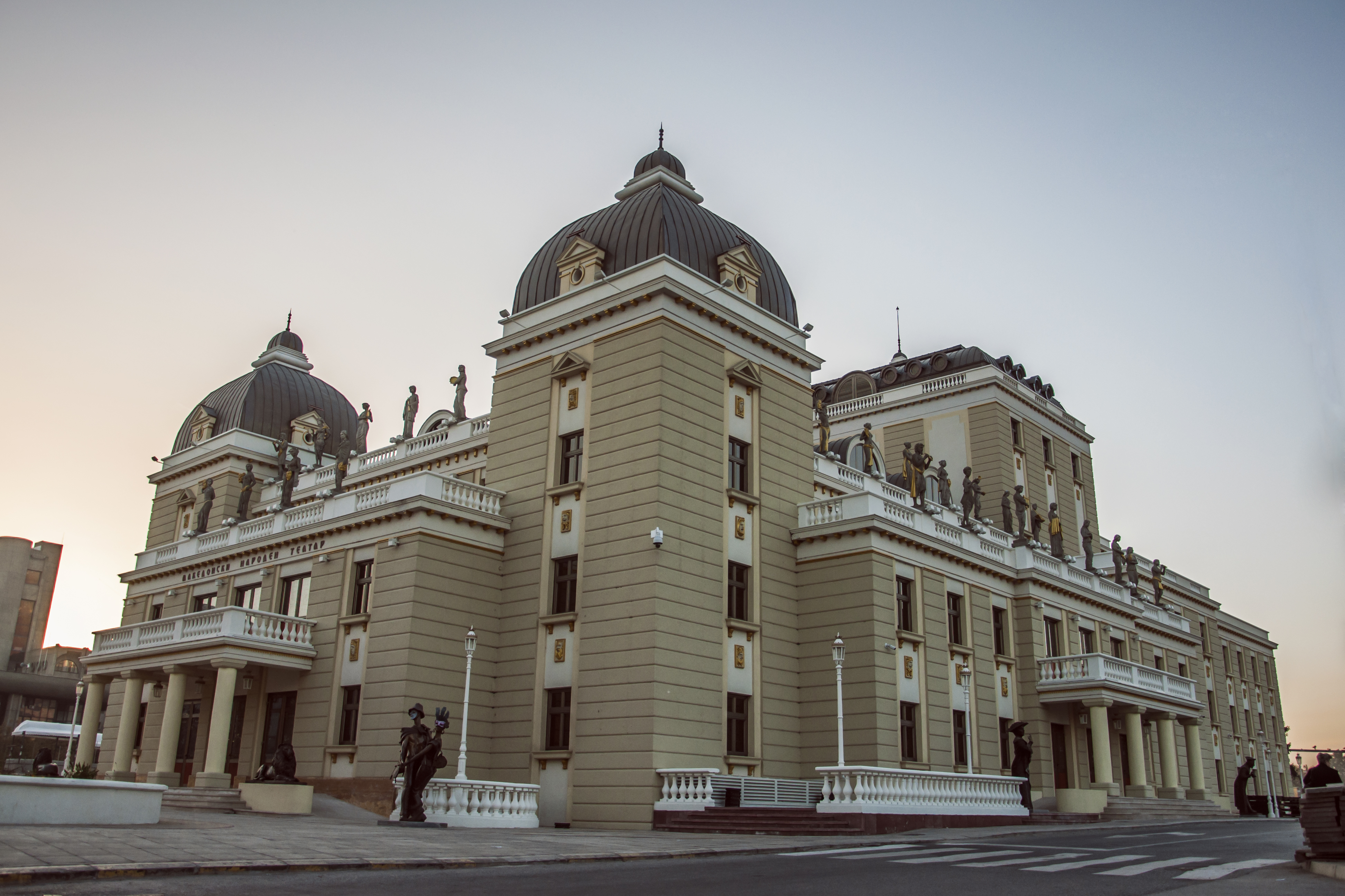 Народниот театар сликан аголно преку ден.